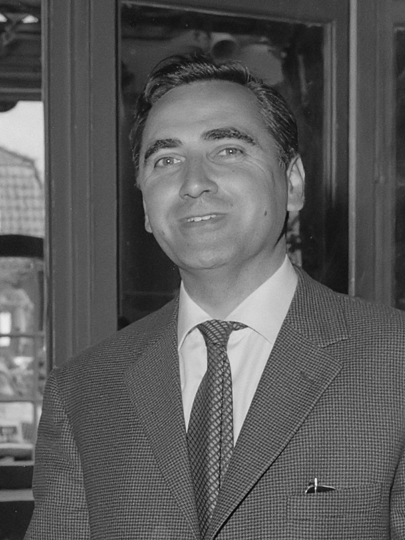 TV-prijs voor dr. L. de Jongh en Wim Meuldijk 8 mei 1962